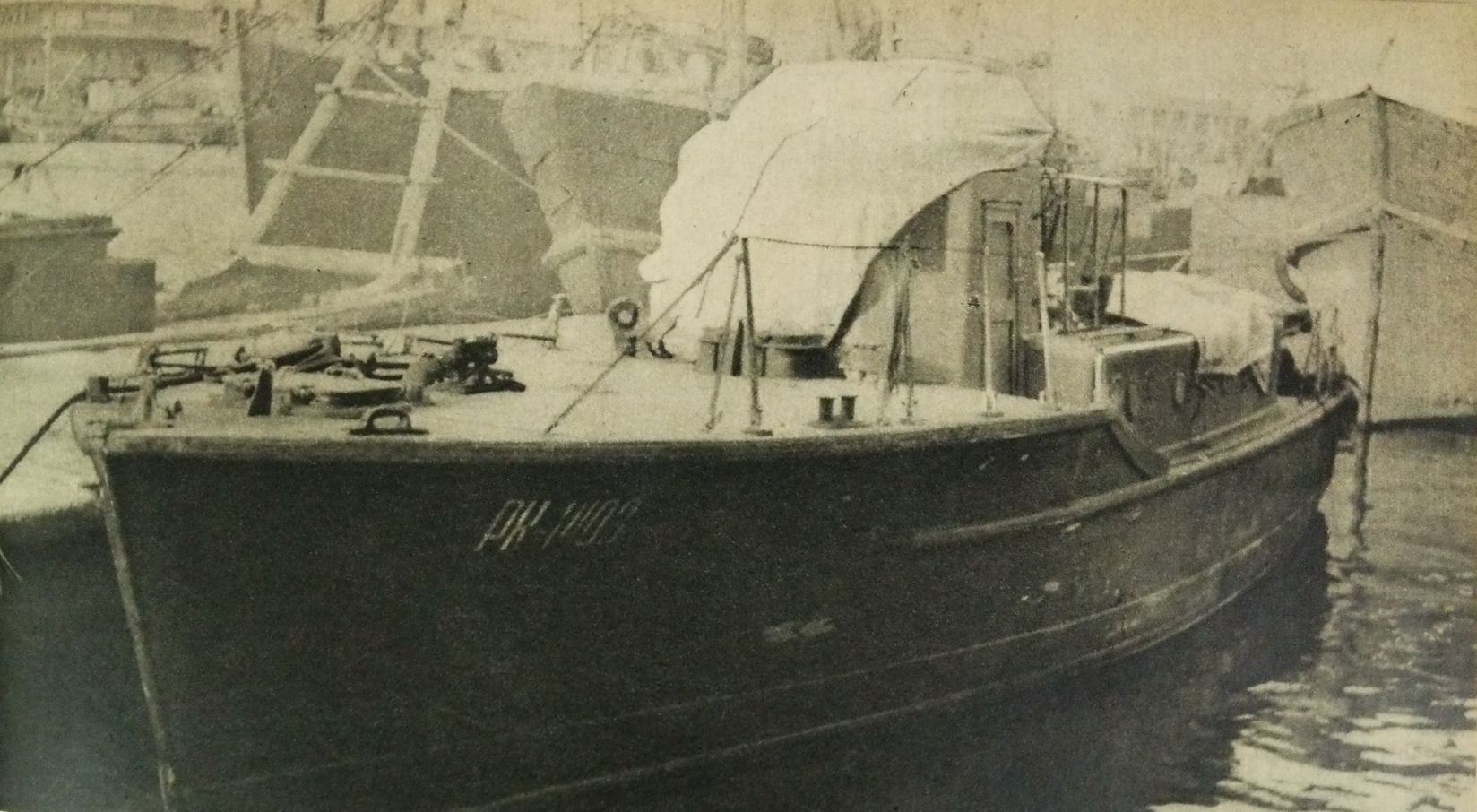 ラズエズノイ号